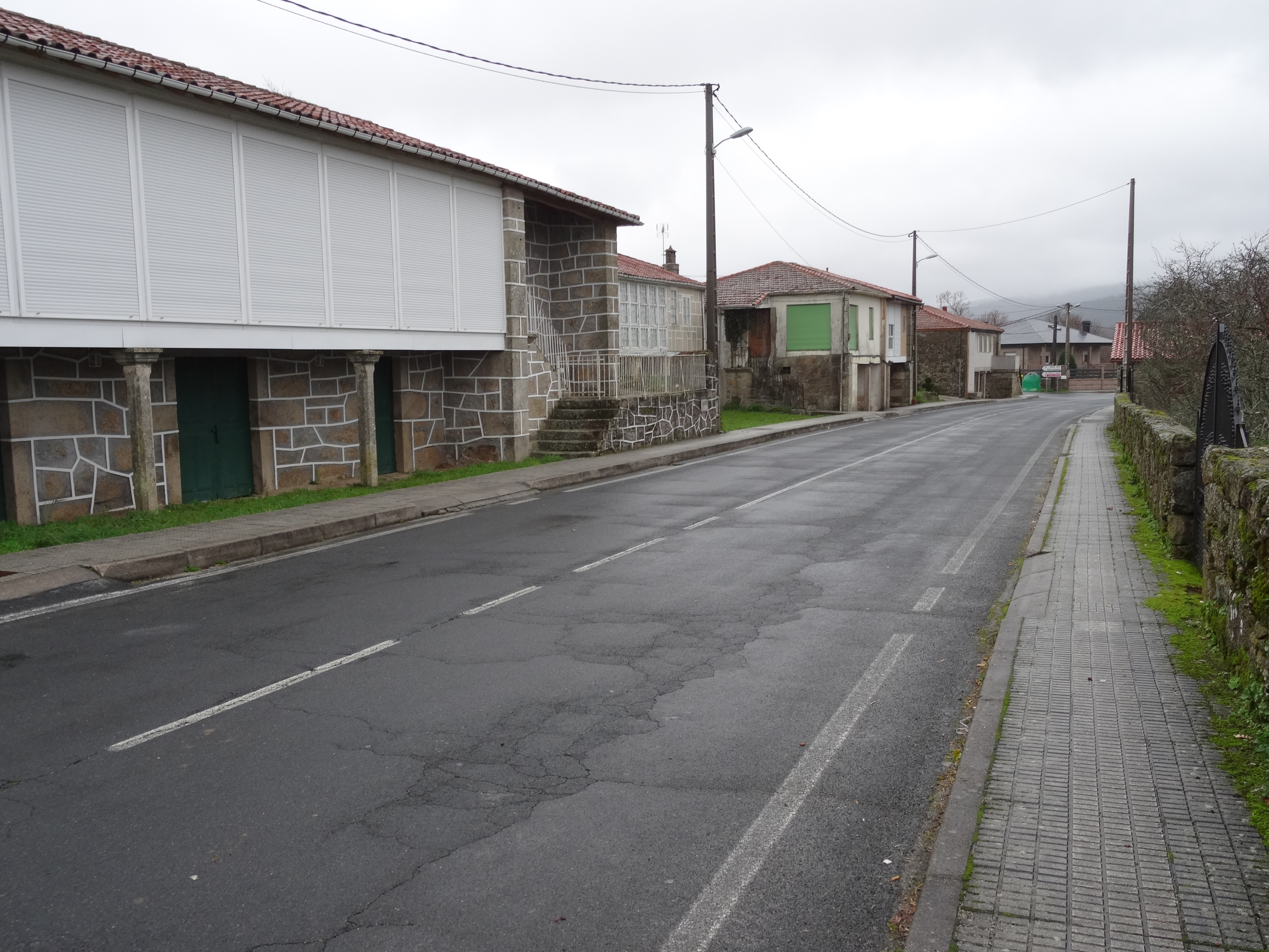 Estrada Bande-Entrimo ó seu paso polo concello de Lobeira, Ourense.